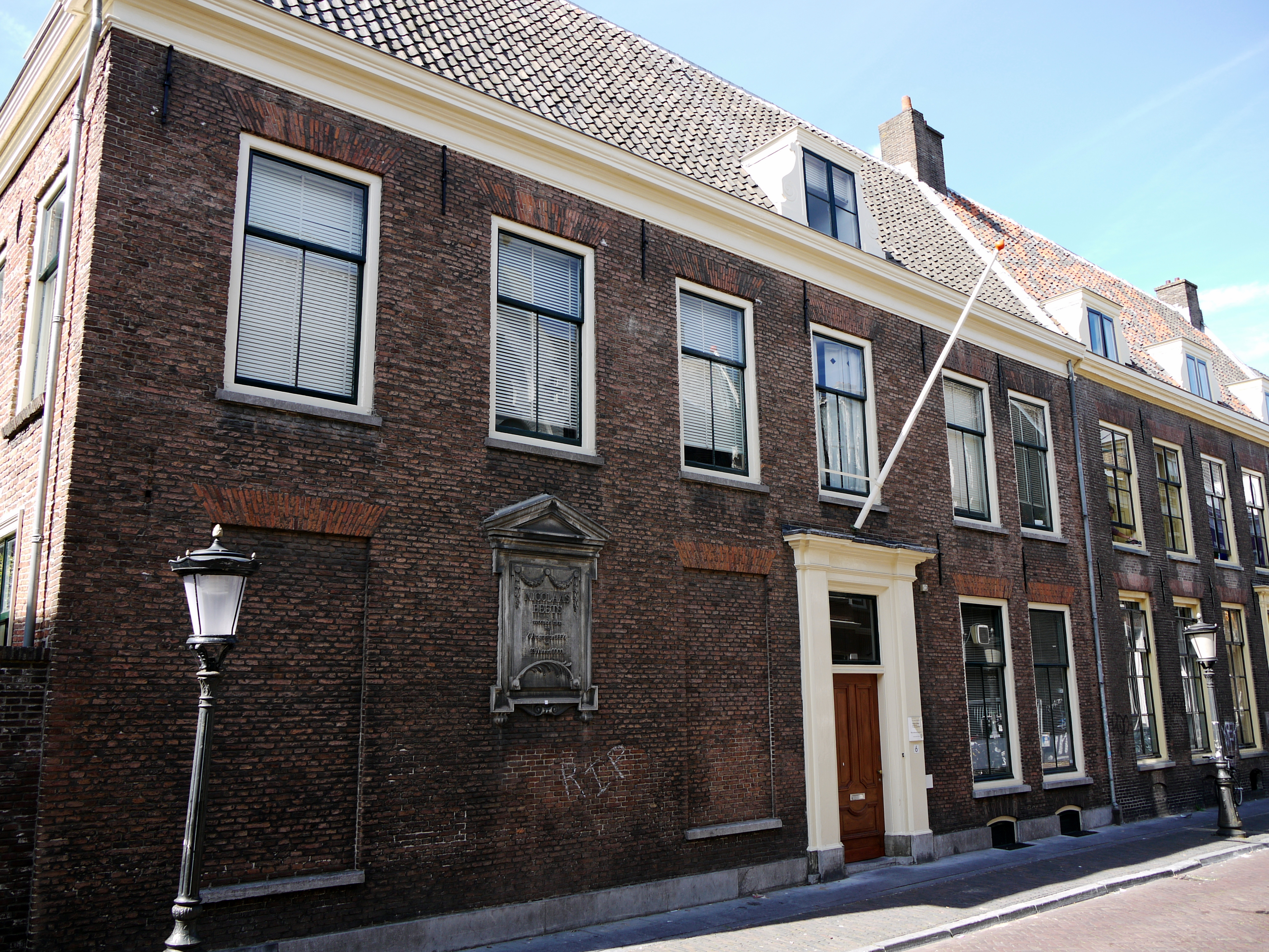 A house at Boothstraat 6, Utrecht.